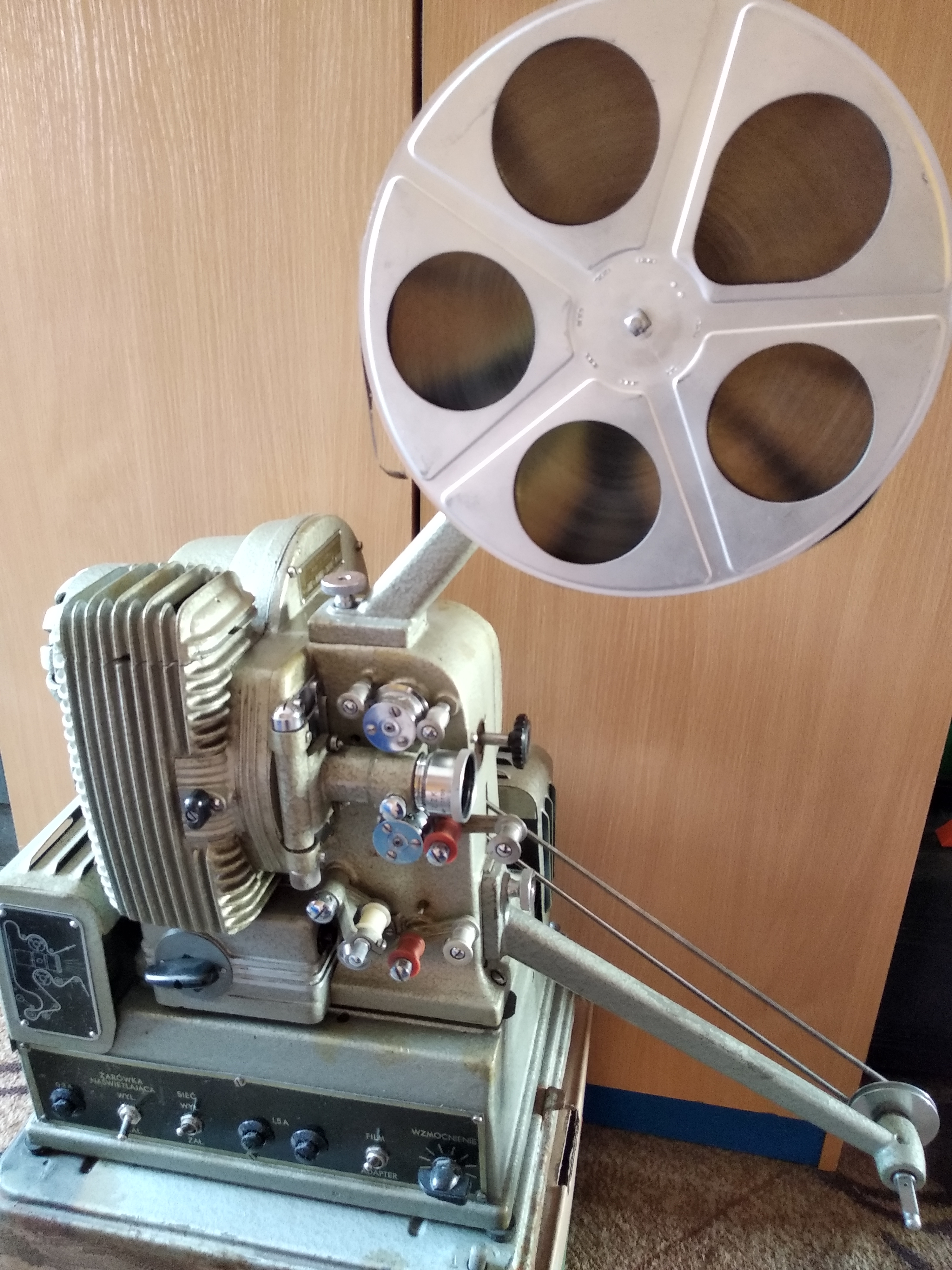 Projektor AP-12